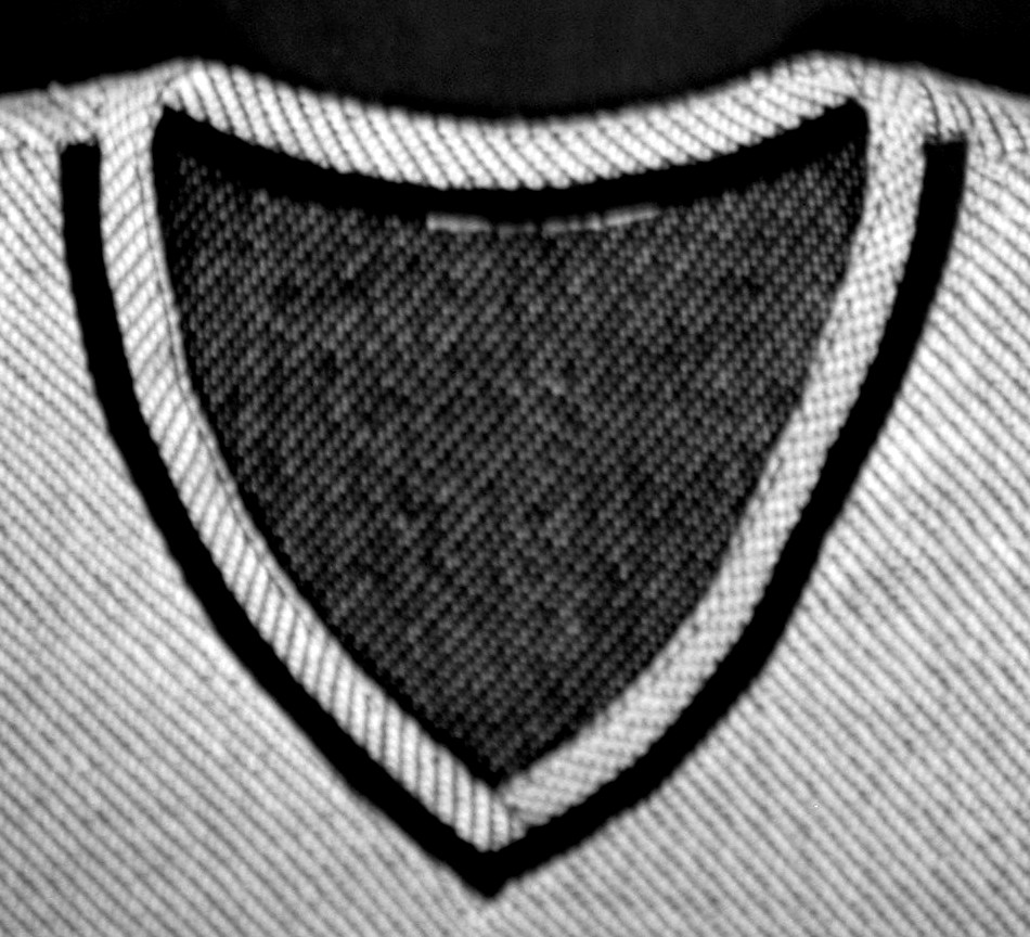 Musterung "Pfeffer und Salz"